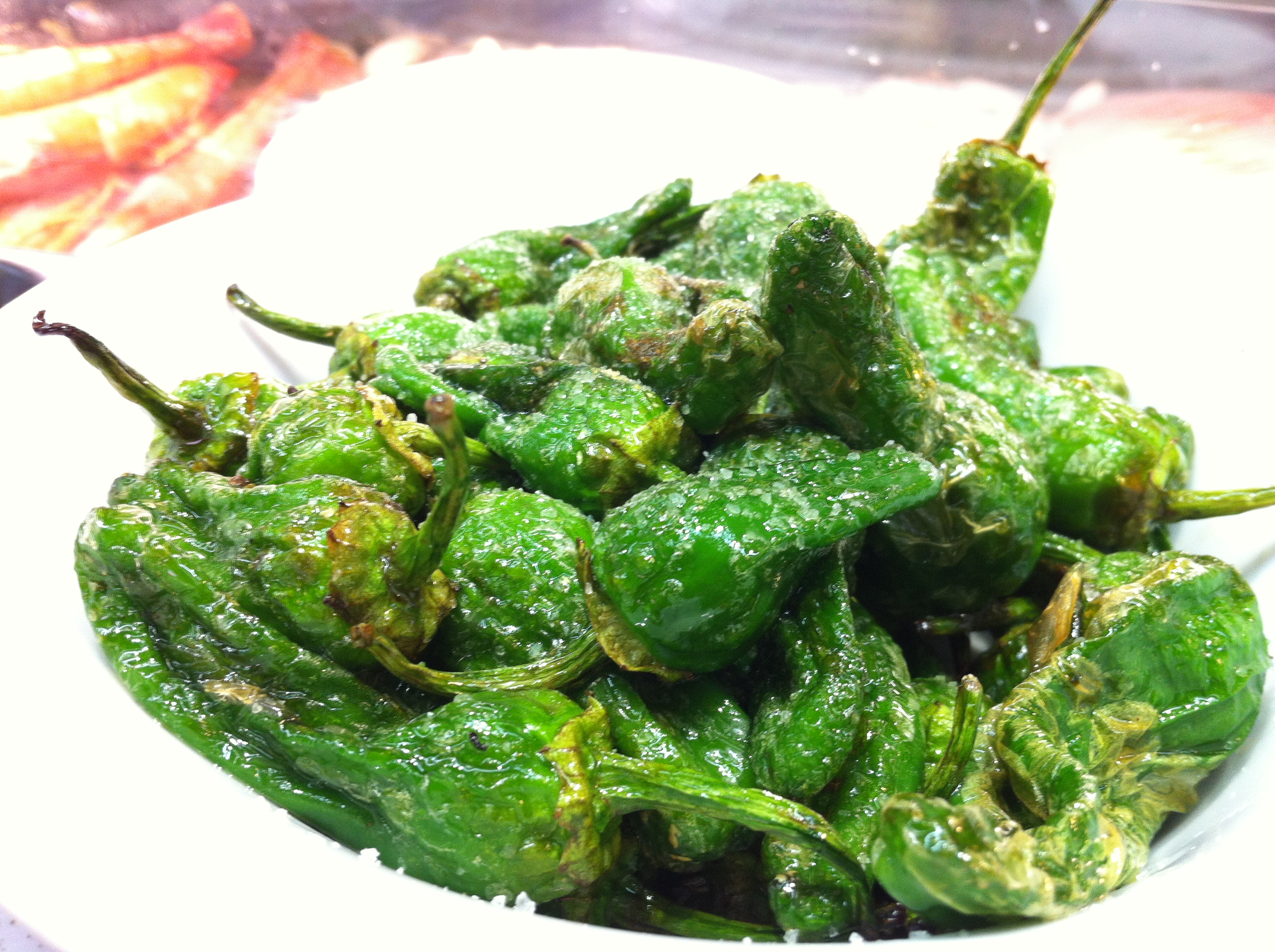 Pimientos de Padrón